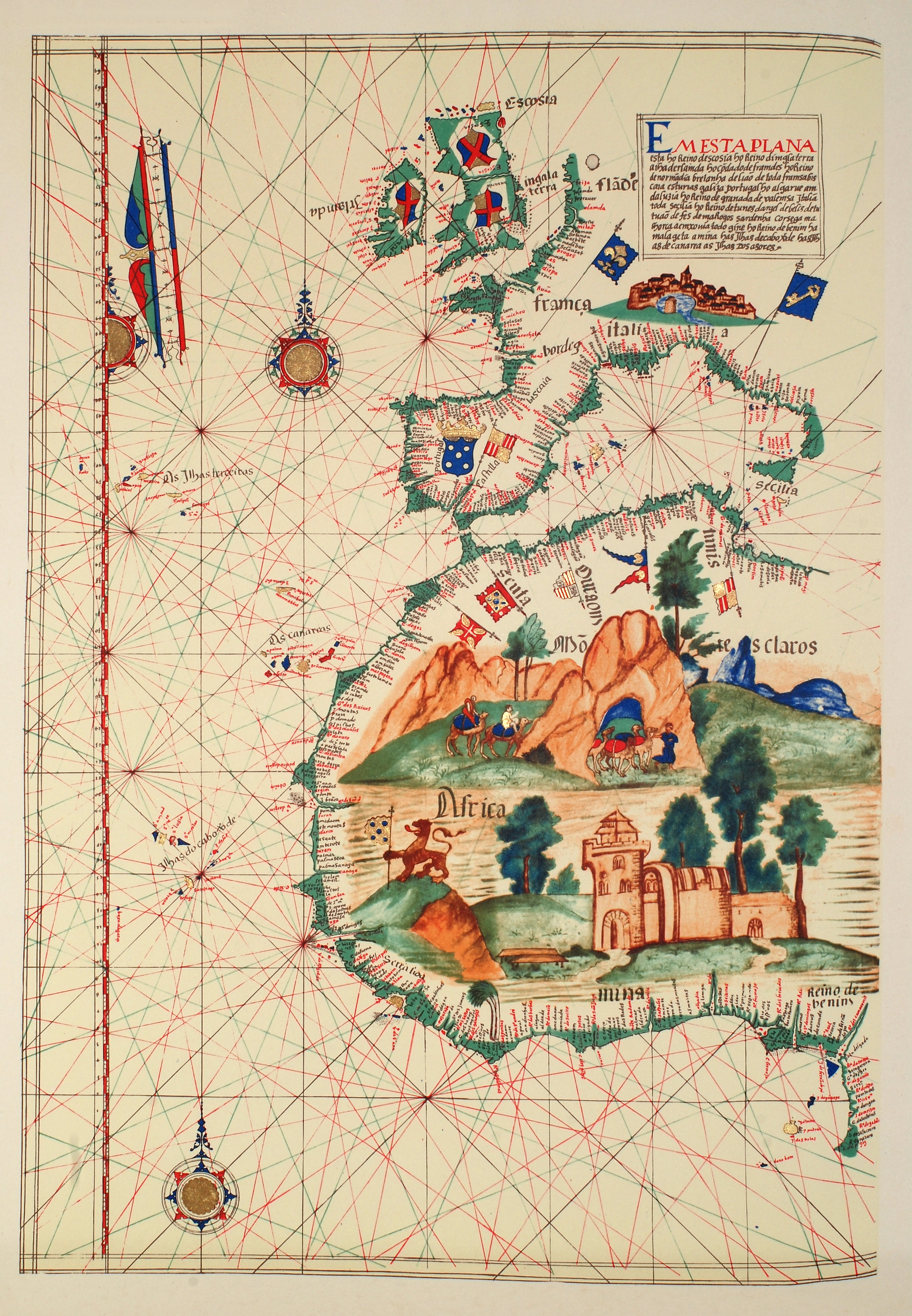 Nautical chart of Portuguese cartographer Lázaro Luís, 1563 (Academia das Ciências, Lisboa)